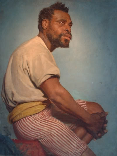 Portret in olieverf Karin Larsson-Bergöö